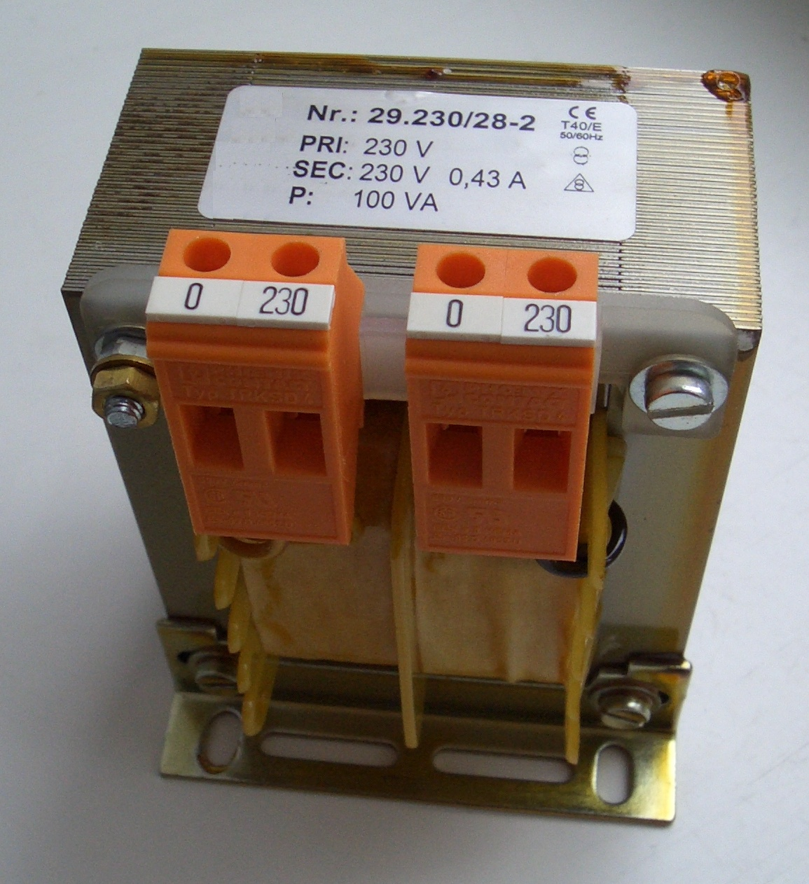 Trenntransformator, Einphasentrafo für 230V mit 100VA